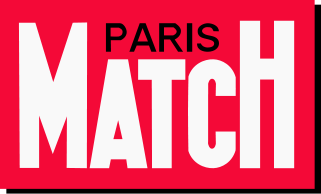 Testata della rivista periodica francese Paris Match